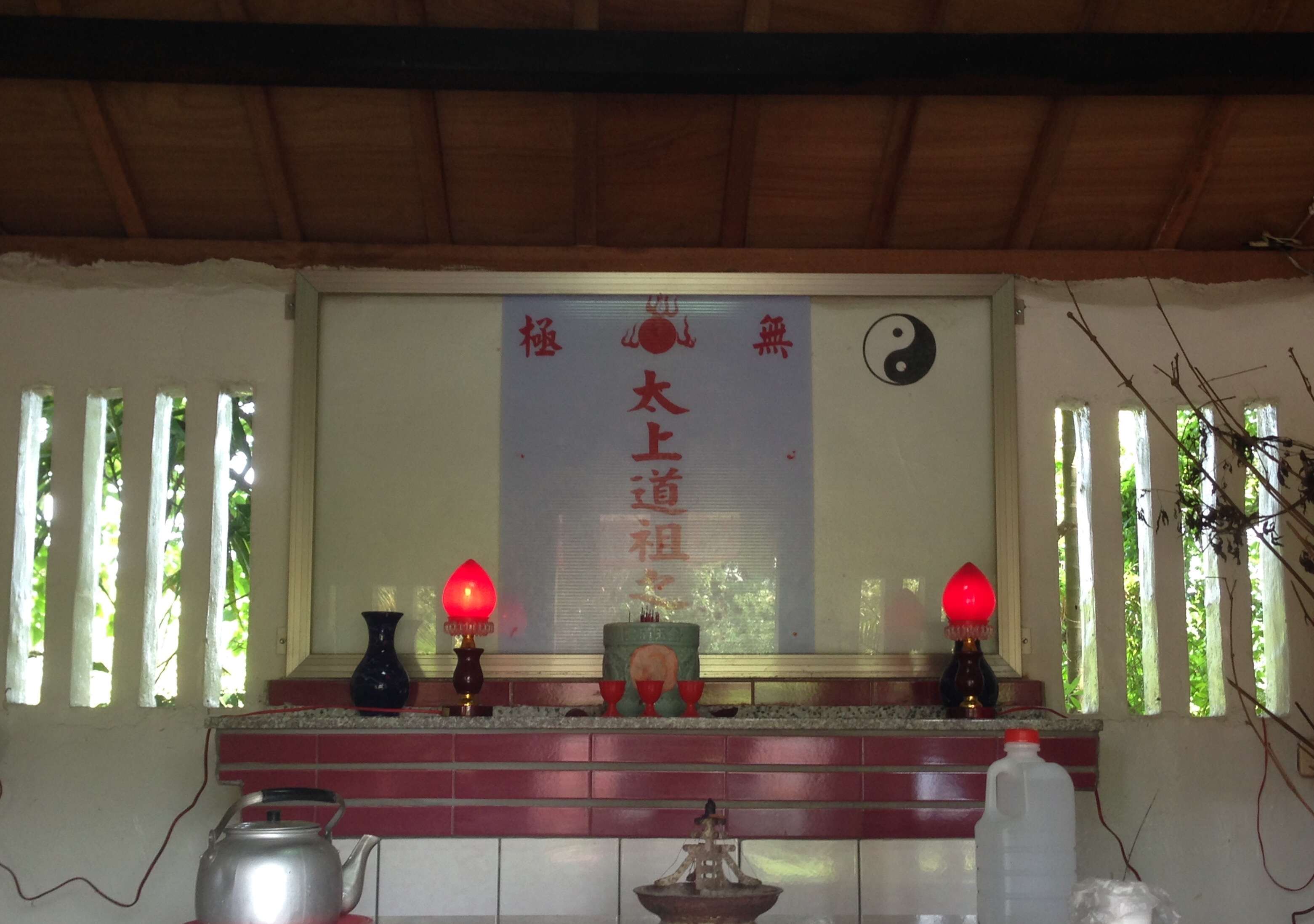 老埤老祖祠牌位